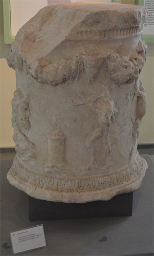 Ara circolare